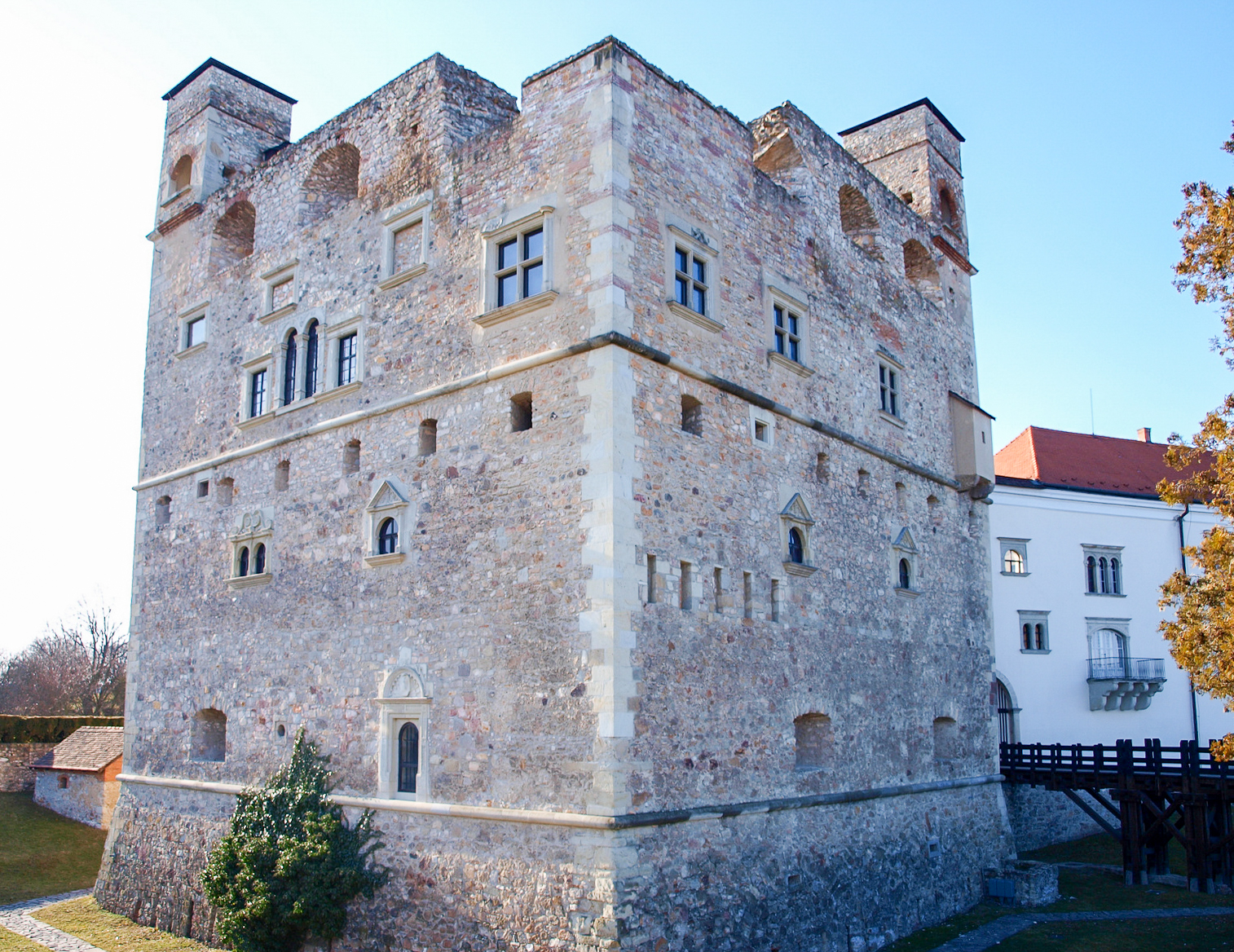 Sárospataki vár, Vörös-torony (olaszbástya) This is a photo of a monument in Hungary. Identifier: 18071